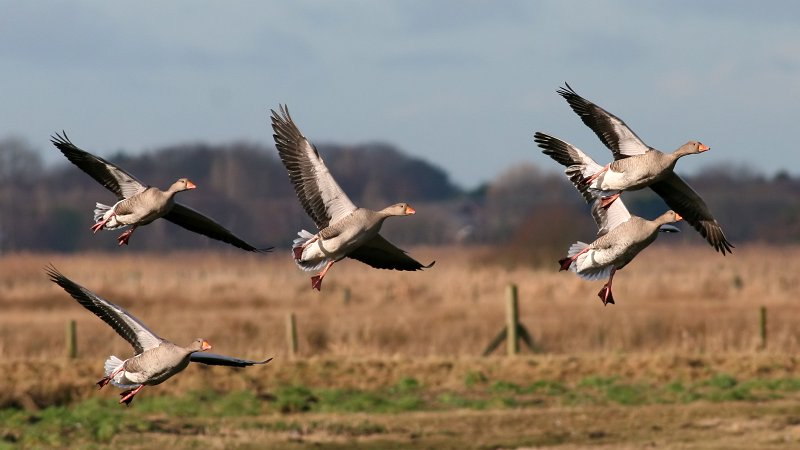 Greylag Goose (Anser anser)